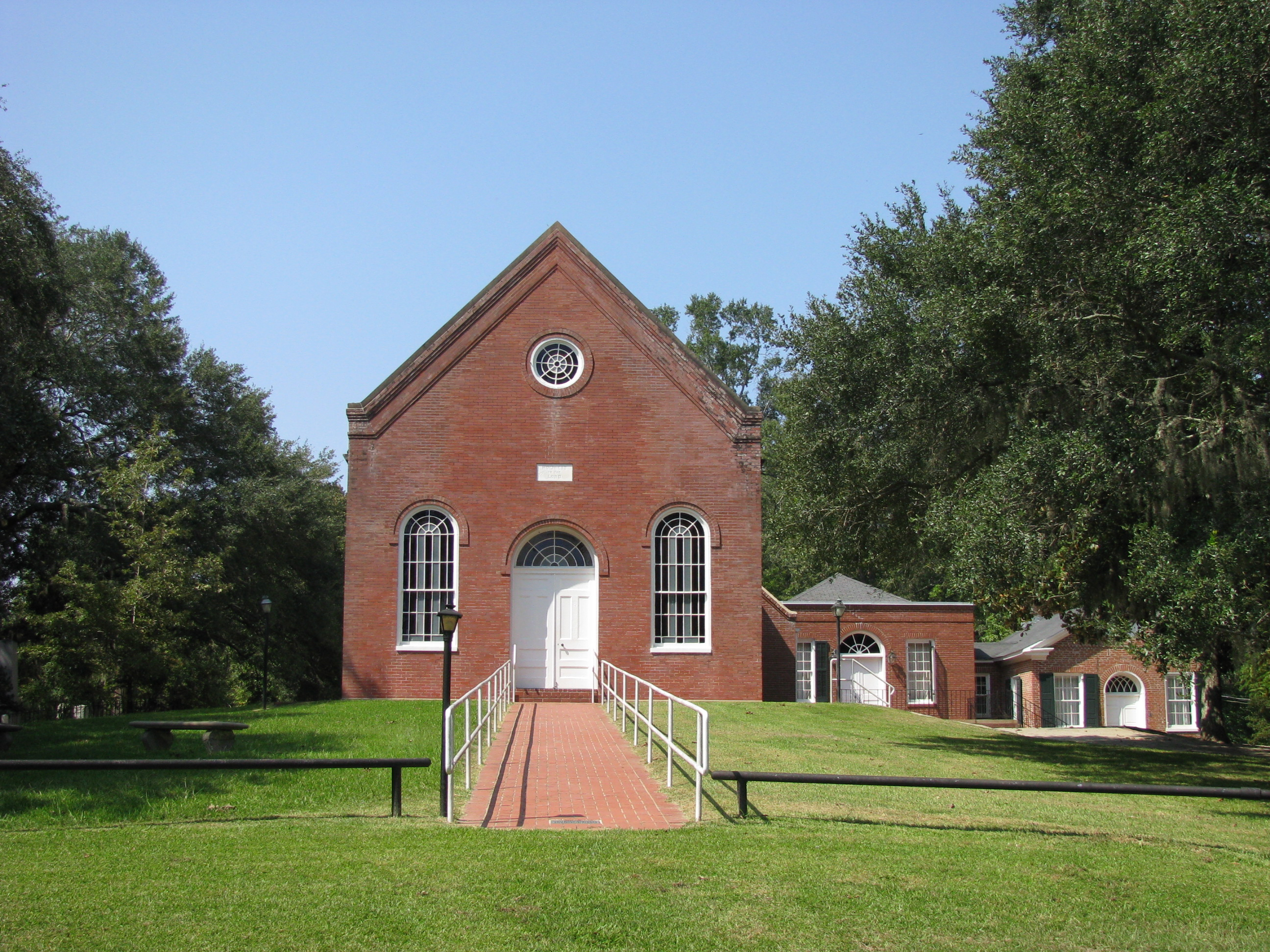 Pine Ridge Presbyterian Church, Pine Ridge, Mississippi.